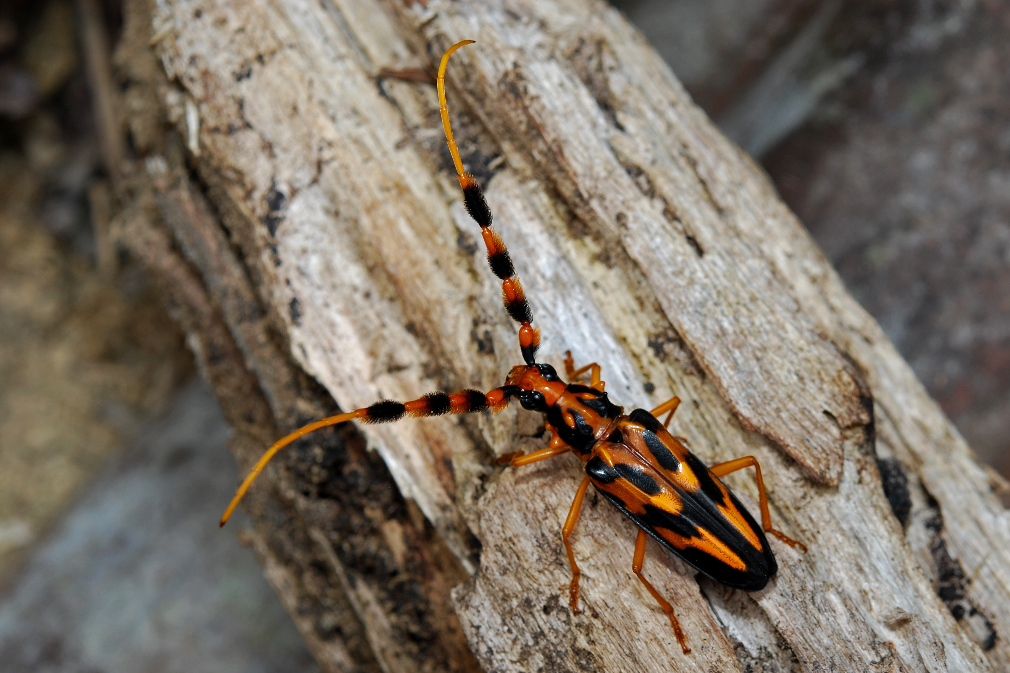 Cerambycidae: Batus barbicornis Parque Nacional Yasuni, Ecuador